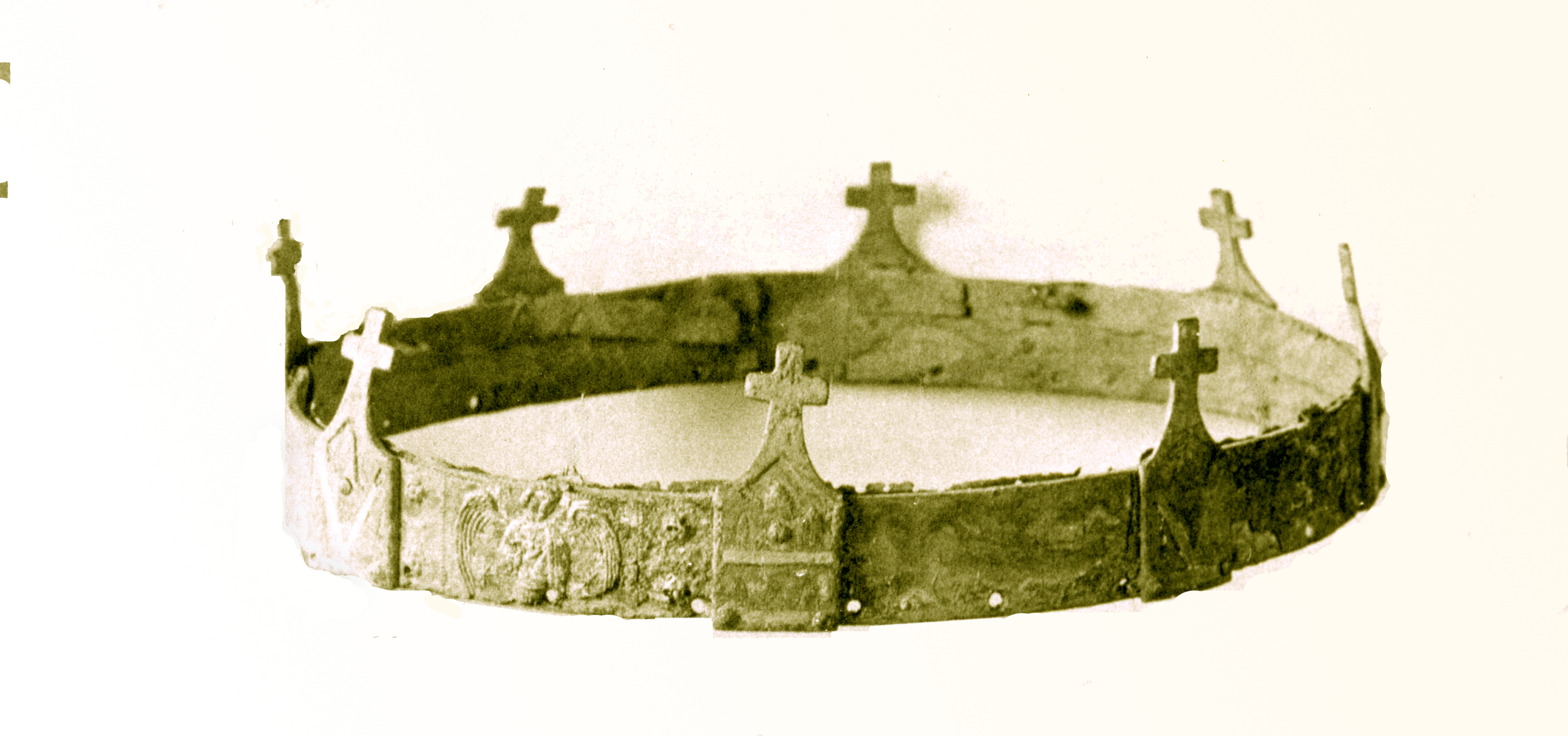 trésor de Cherves : luminaire de XIIIe siècle, Cherves-Richemont, Charente, France.